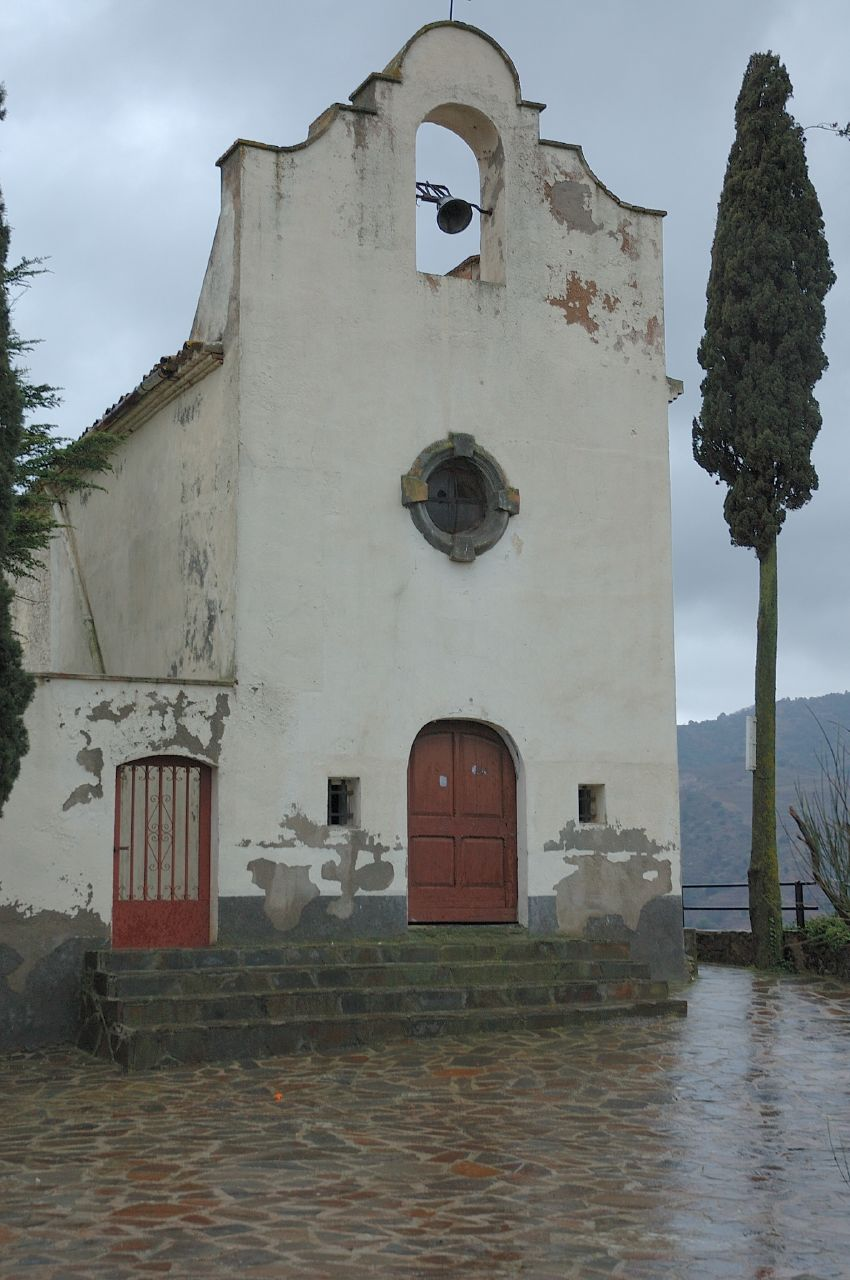 Ermita de Sant Antoni Abat (1610) a Porrera, el Priorat, Catalunya.